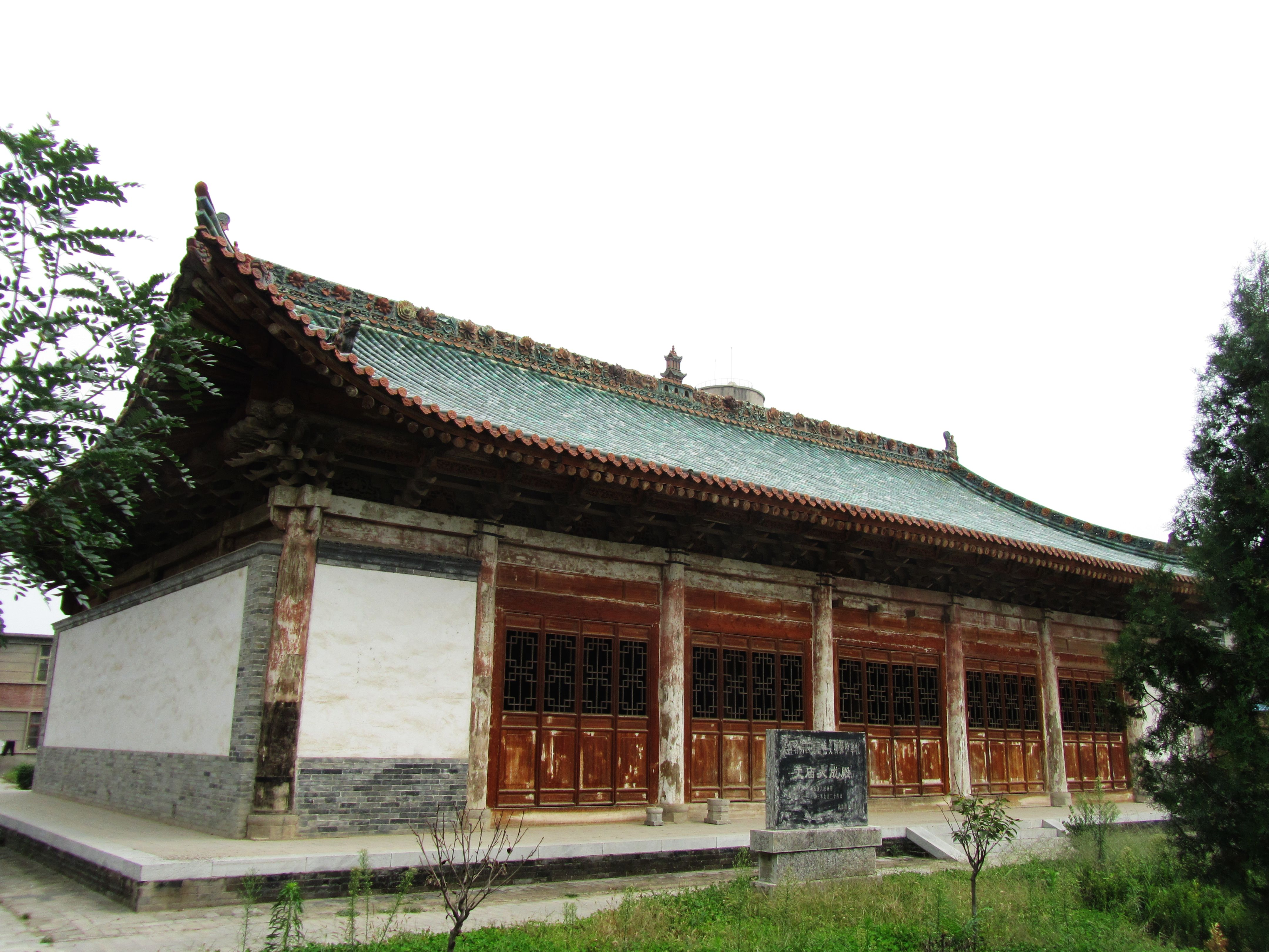 渭南文庙仅存的建筑——大成殿。